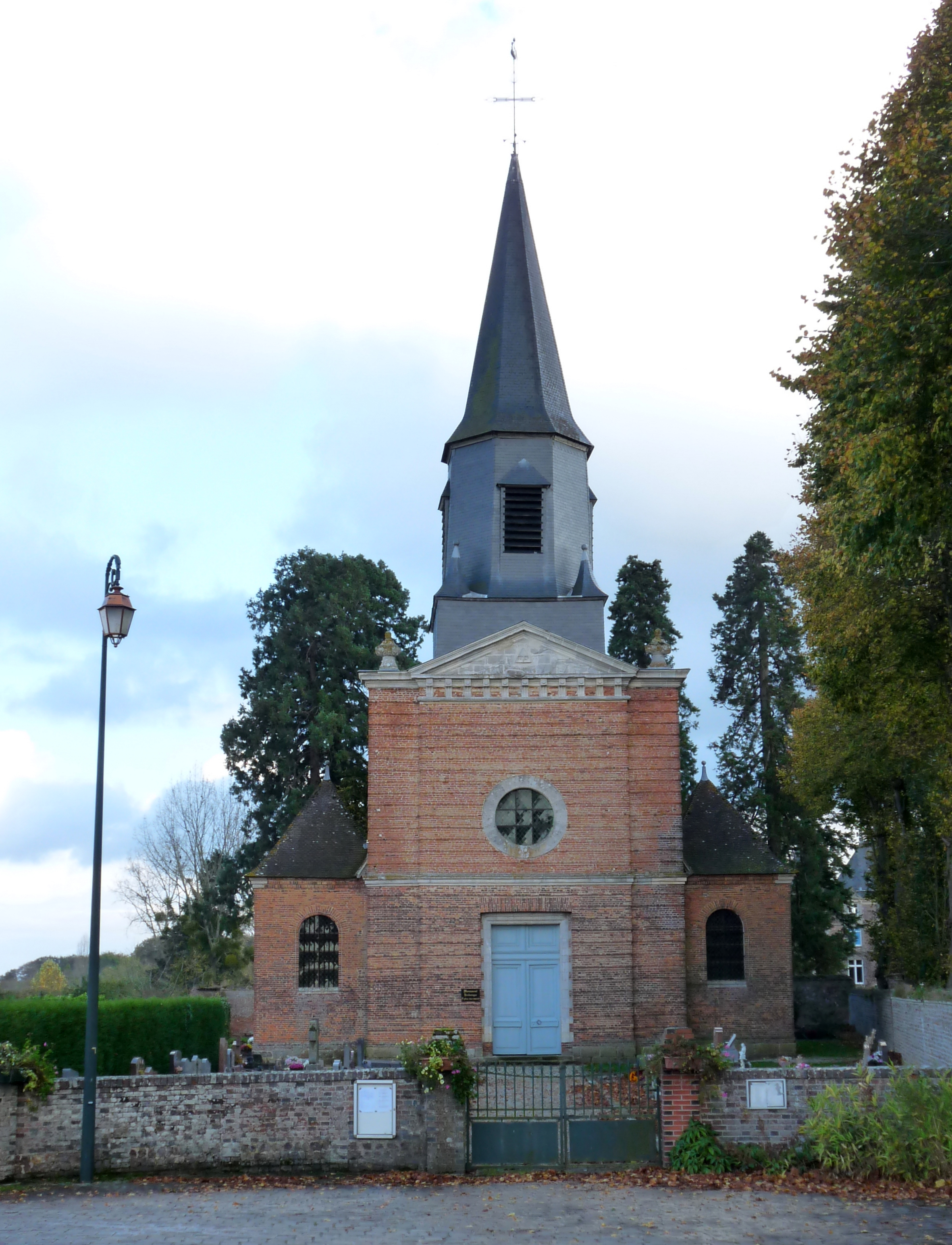 Église Saint-Julien de Bois-Normand-près-Lyre